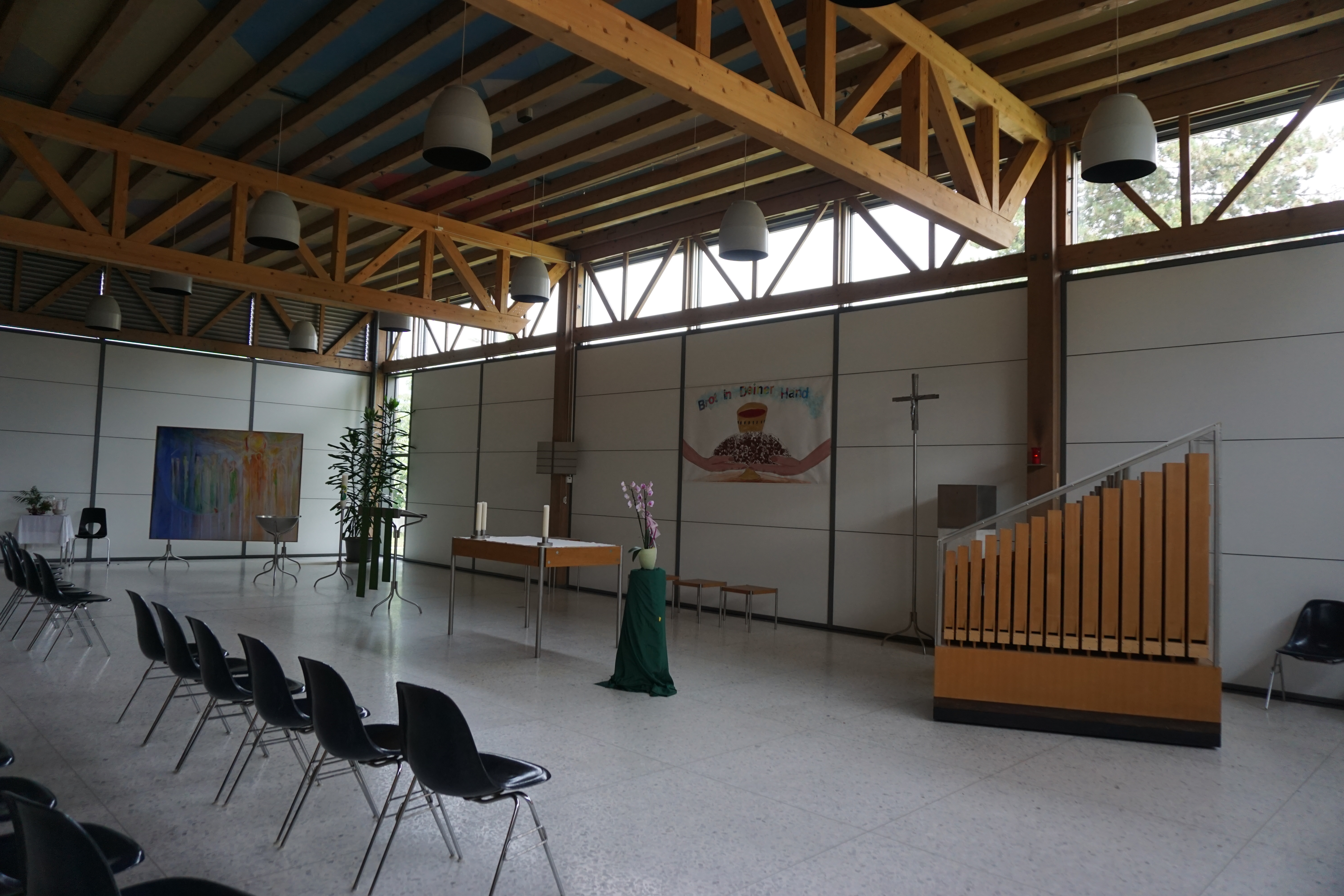 Kirche St. Martin, Lengnau. Innenraum